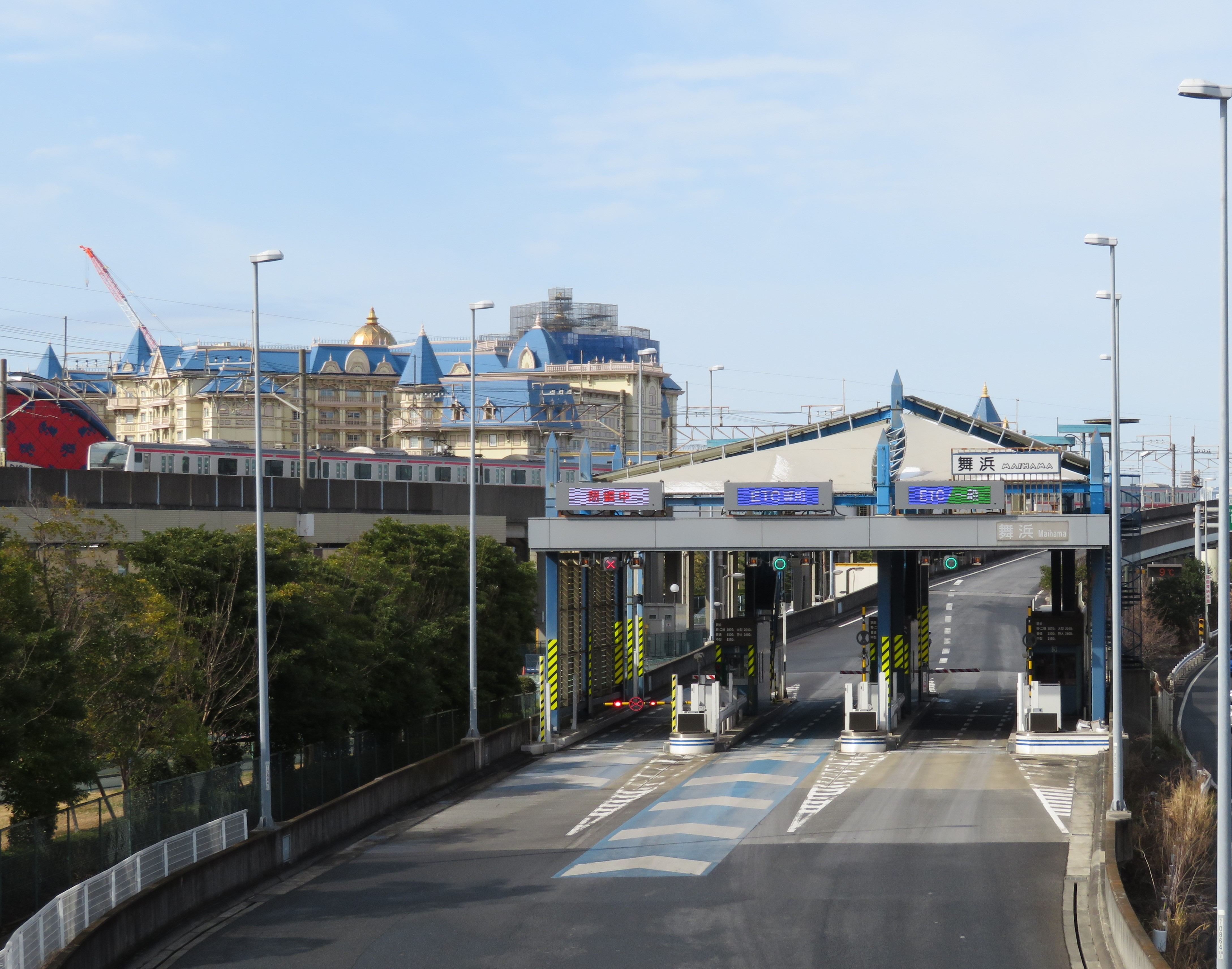 首都高速道路湾岸線 舞浜入口料金所付近 Canon PowerShot SX720 HS